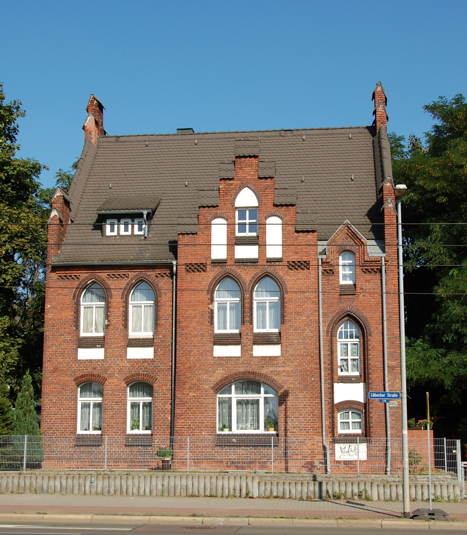 Haus Lübecker Straße 135 in Magdeburg